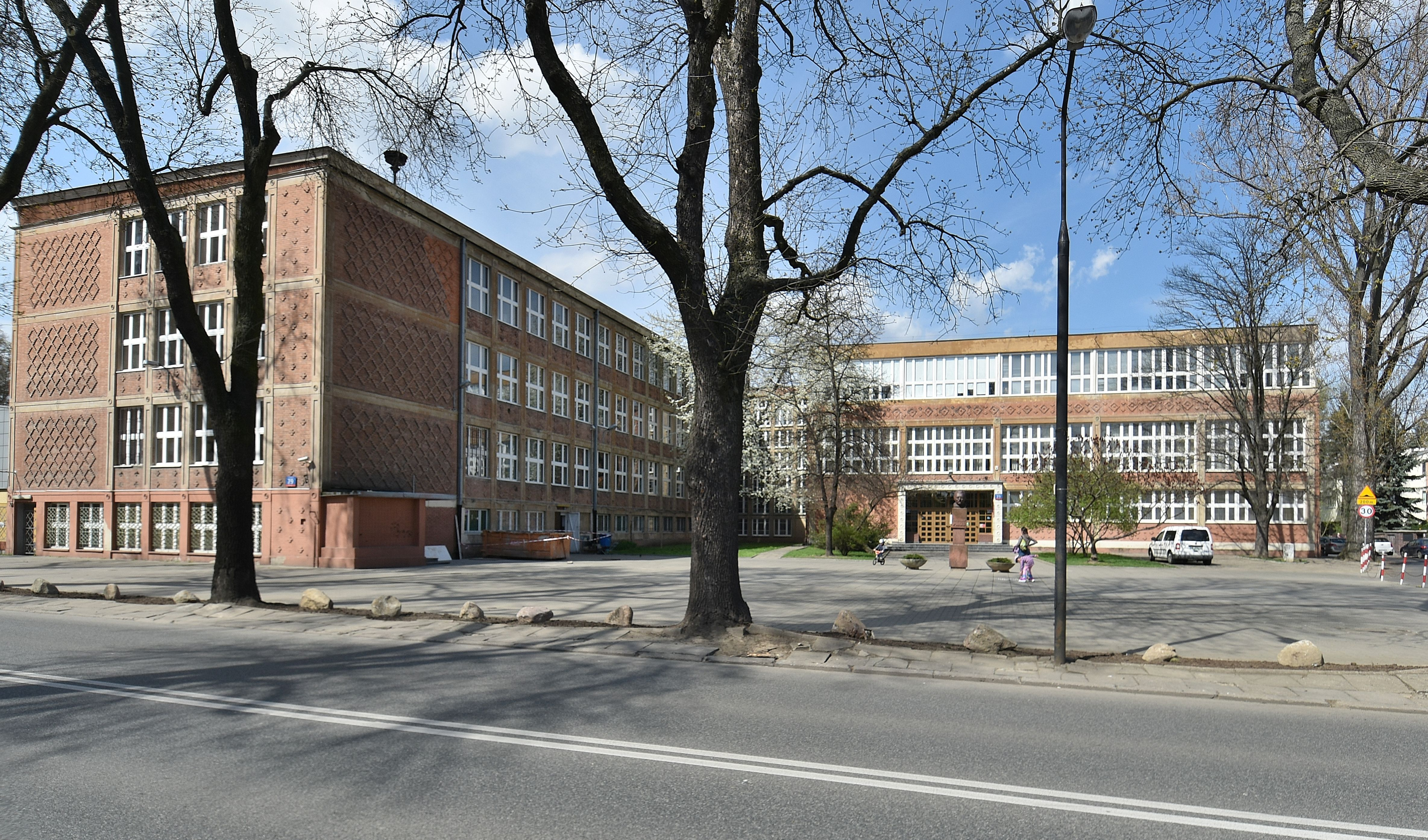 XXXV Liceum Ogólnokształcące im. Bolesława Prusa przy ul. Zwycięzców 7/9 w Warszawie